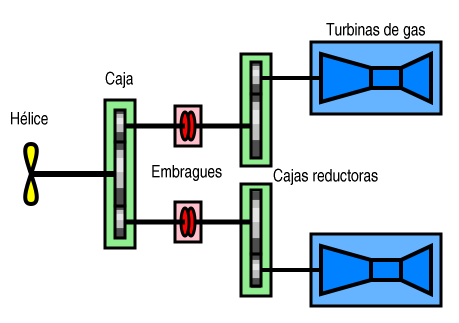 Esquema de un sistema de propulsión COGAG Same as Image:COGAG-diagram.png with Spanish legend. Modified version of a public domain drawing made by Alureiter. Modifications also released into public domain. Idéntica a Image:COGAG-diagram.png con leyendas en español. Versión modificada de un dibujo hecho por Alureiter y puesto por él en el dominio público. Las modificaciones son también colocadas en el dominio público.